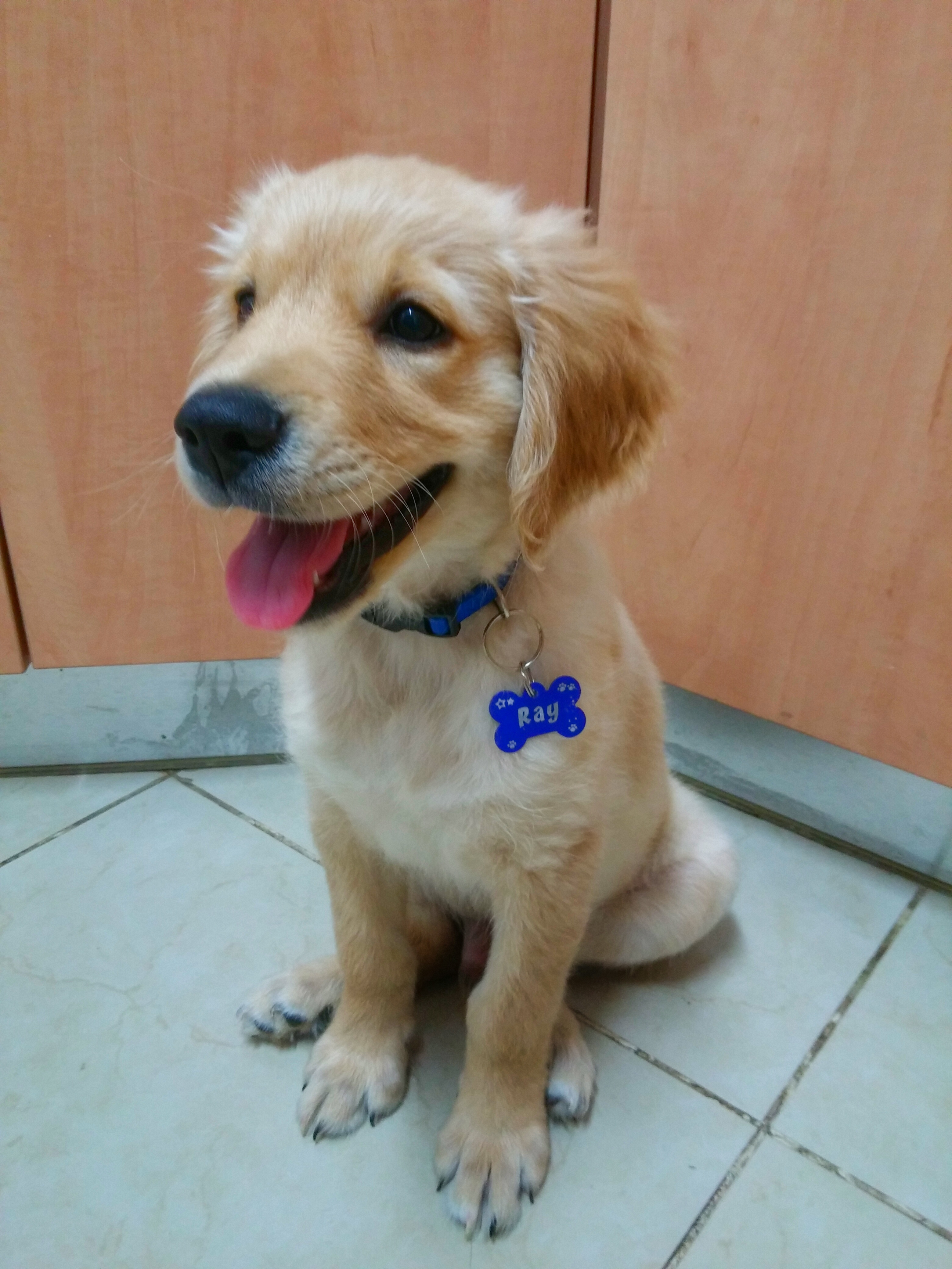 גור (3 חודשים), גולדן רטריבר